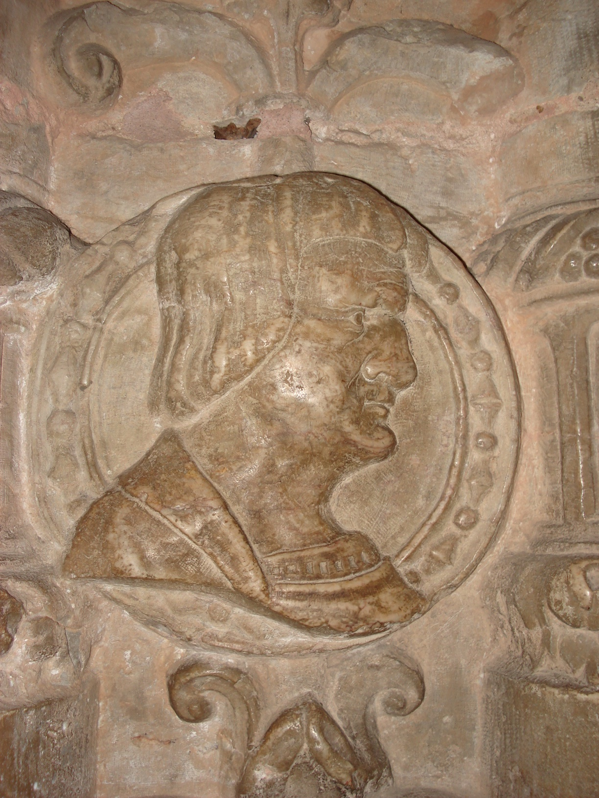 MEDALLÓN DE JUAN DE CASTILLO. MONASTERIO DE LOS JERÓNIMOS. LISBOA